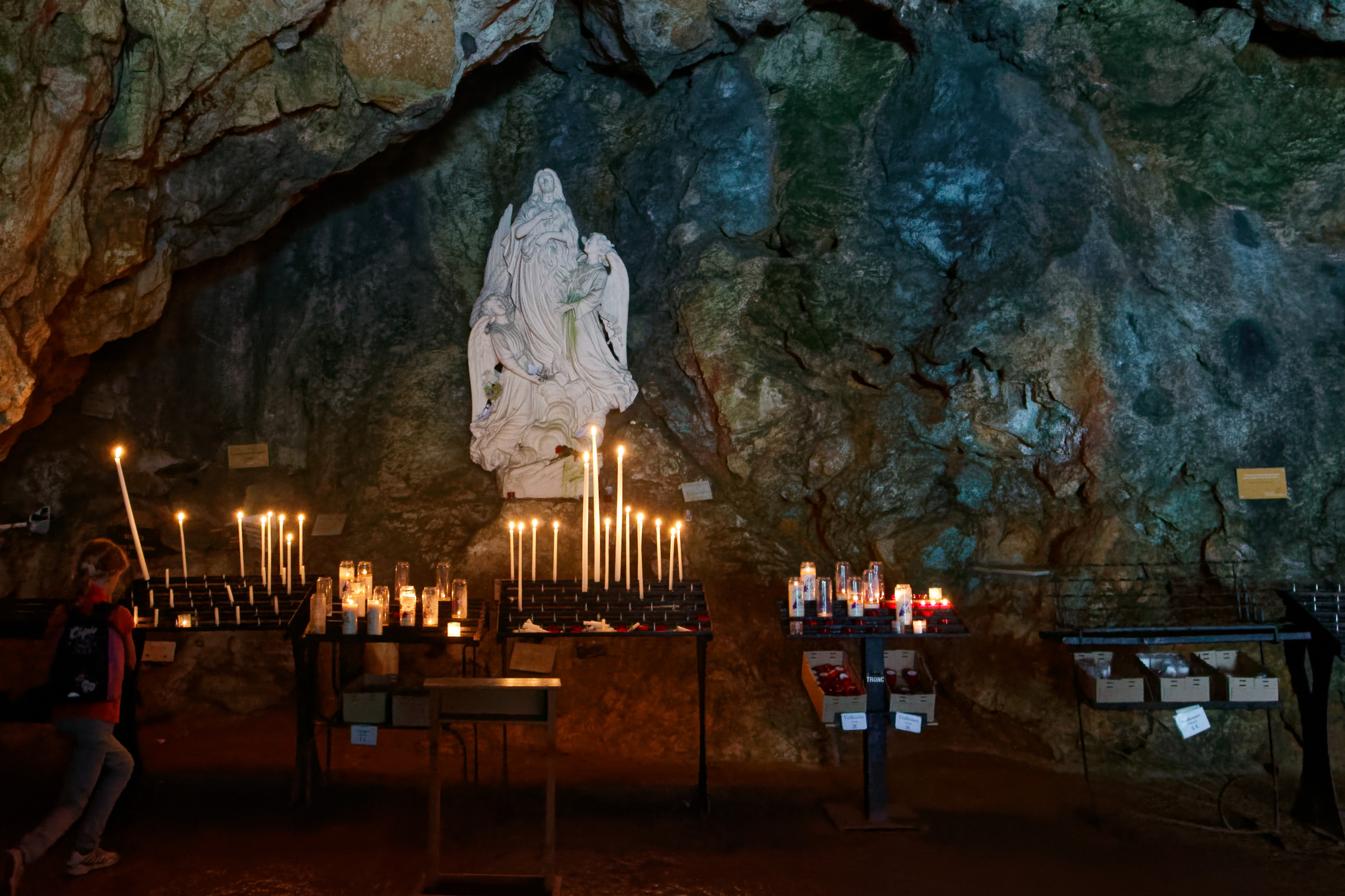 Grottenheiligtum der Maria Magdalena im Massif de la Sainte-Baume in der Provence, Statue der Maria Magdalena